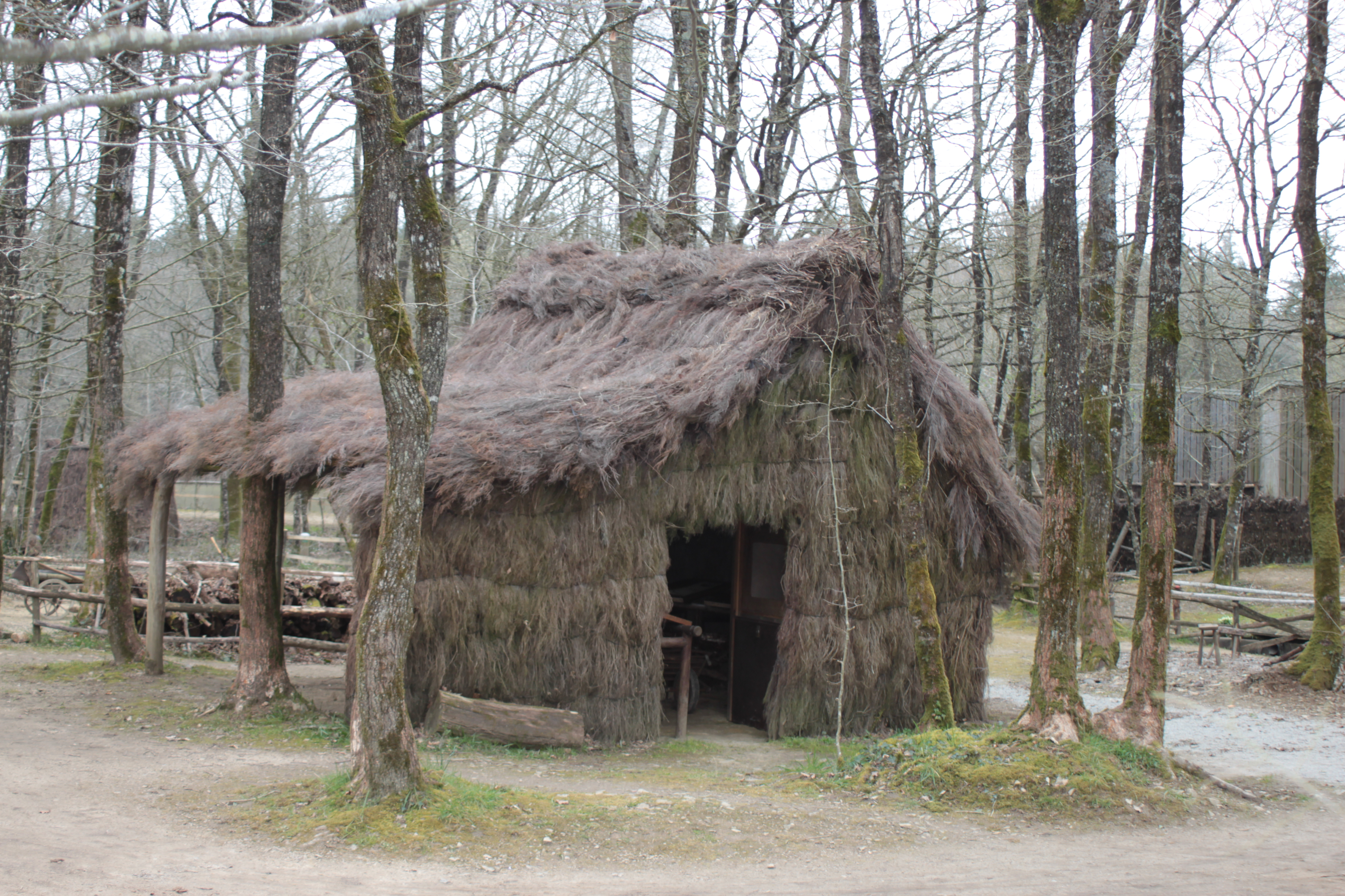 Cabane au refuge de Grasla, Fr-85-les Brouzils.